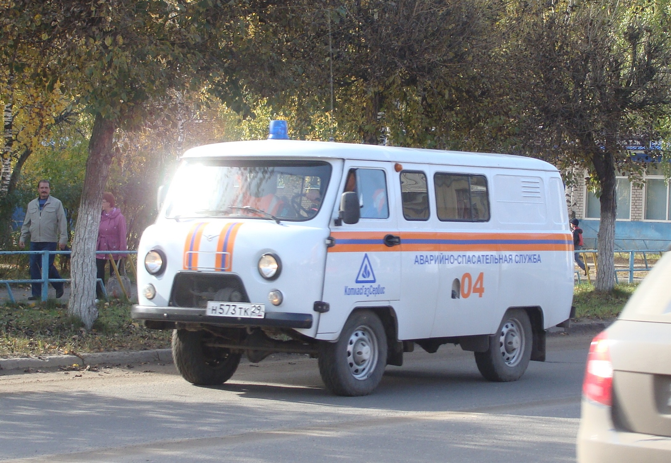 УАЗ 452 газоспасателей КотласГазСервис, Коряжма